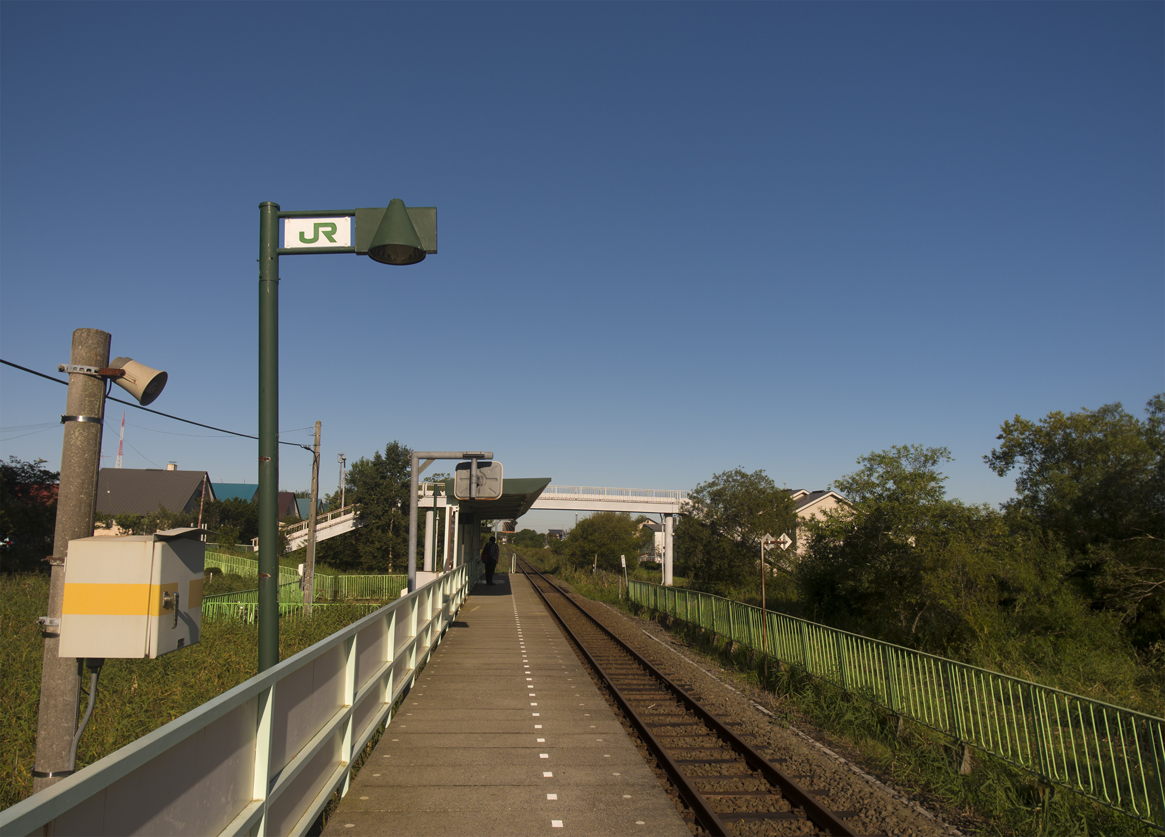 北海道旅客鉄道株式会社根室本線（花咲線）武佐駅ホーム